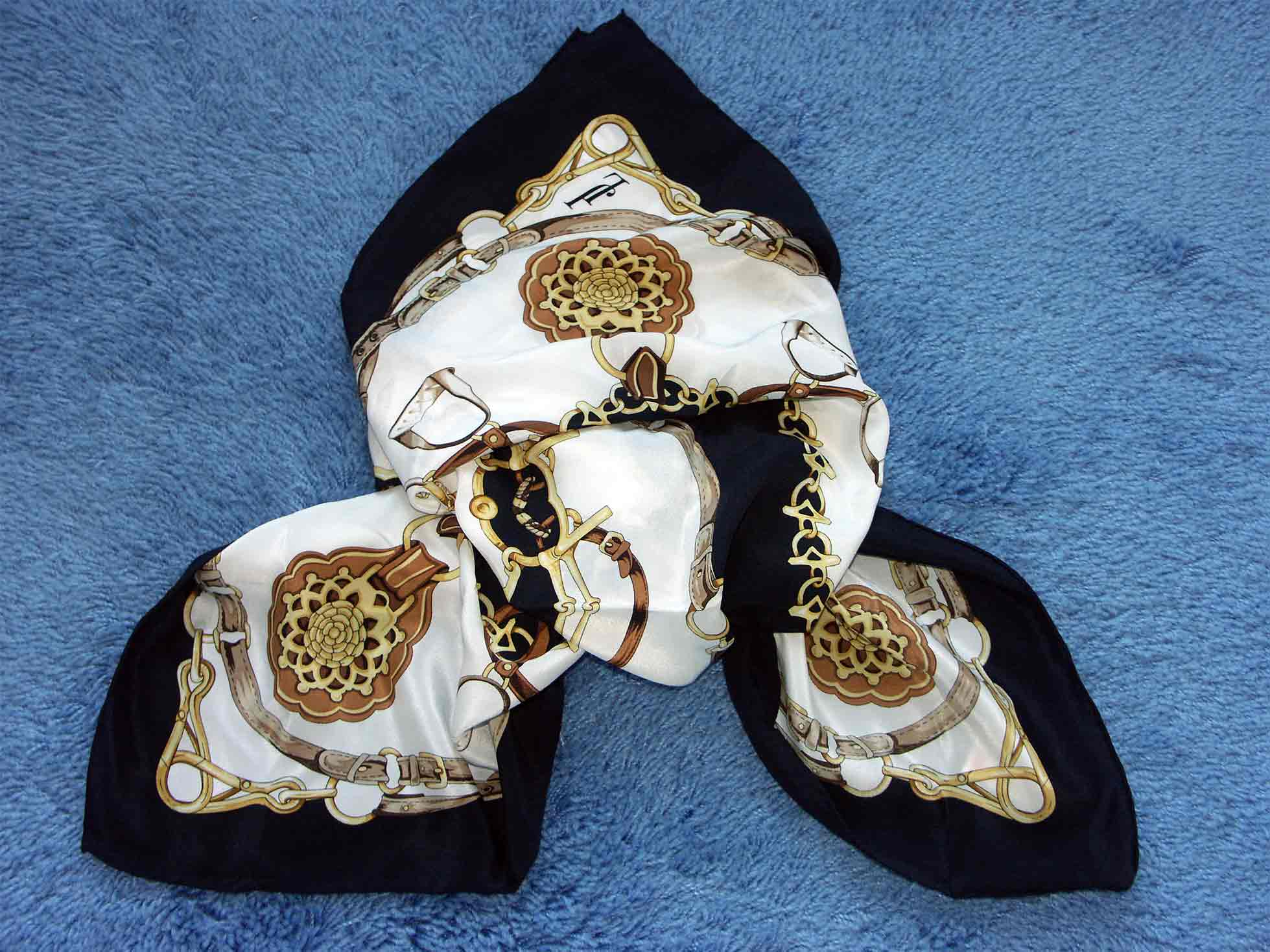 Seidentuch/ silkscarf/ Foulard, im klassischen Équipagestil, 100% Seide/ pure silk, von JL, eignes Foto Bettenburg 22:42, 16. Jan 2006 (CET)